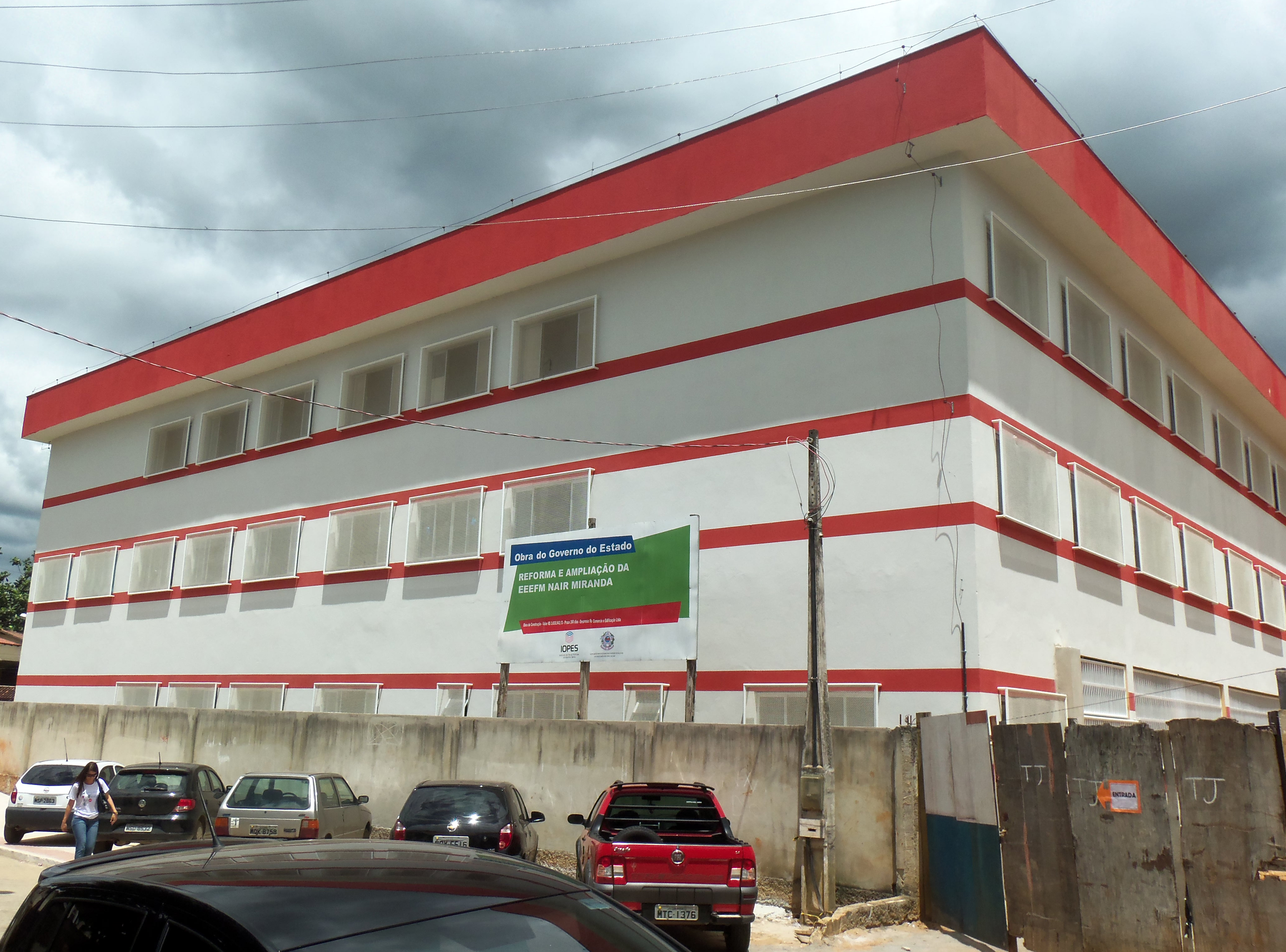 Escola Estadual de Ensino Fundamental e Médio Nair Miranda, em Fundão, Espírito Santo.